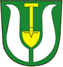 Znak obce Žákovice